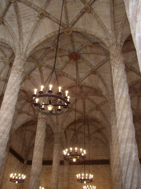 Valencia (Comunidad Valenciana), España. Valencia. Lonja. Fotografía realizada el 22 febrero de 2003 por el autor Usuario. Pelayo2.